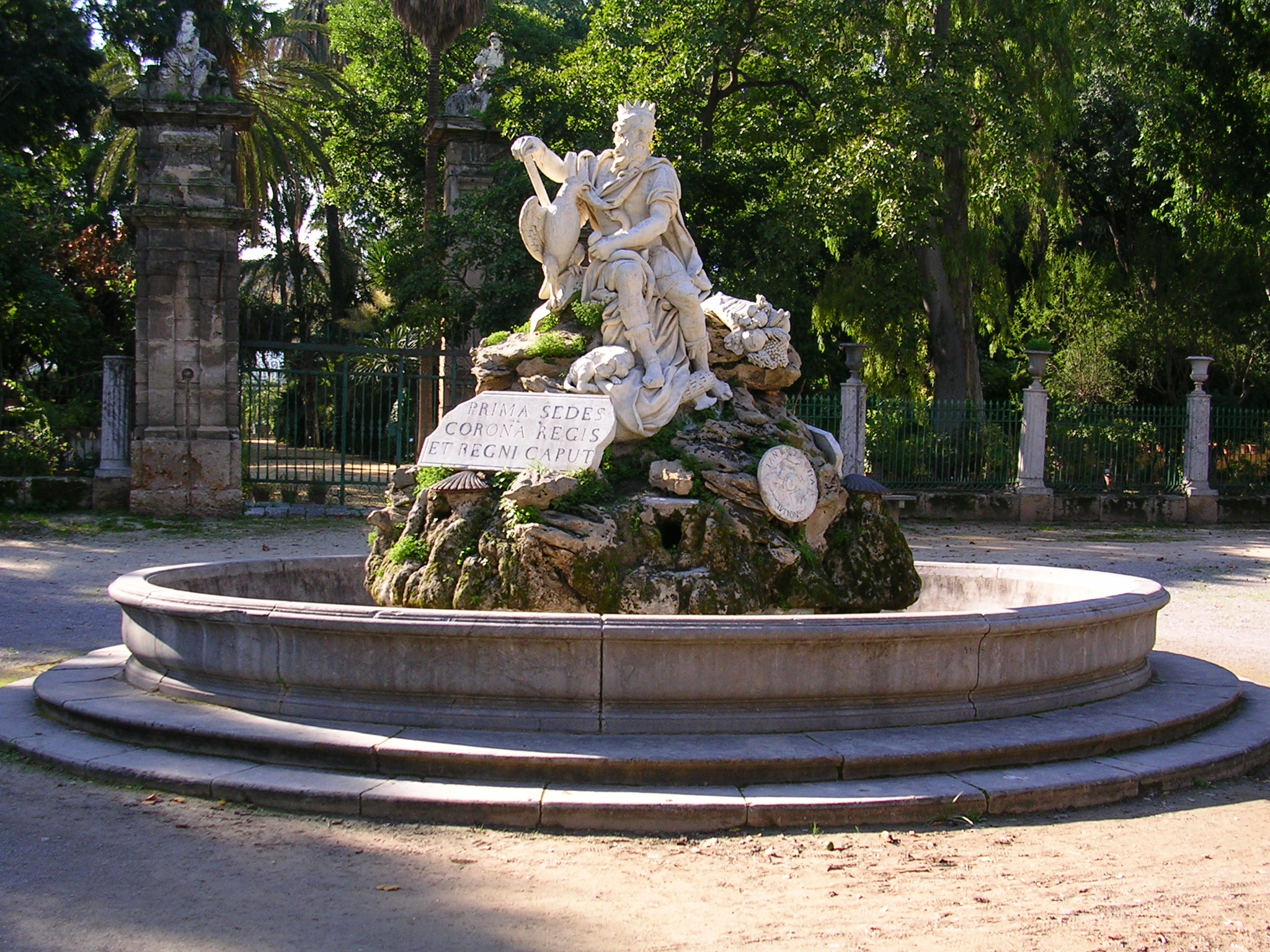 Il Genio di Palermo by Ignazio Marabitti - Villa Giulia a Palermo - Italy.